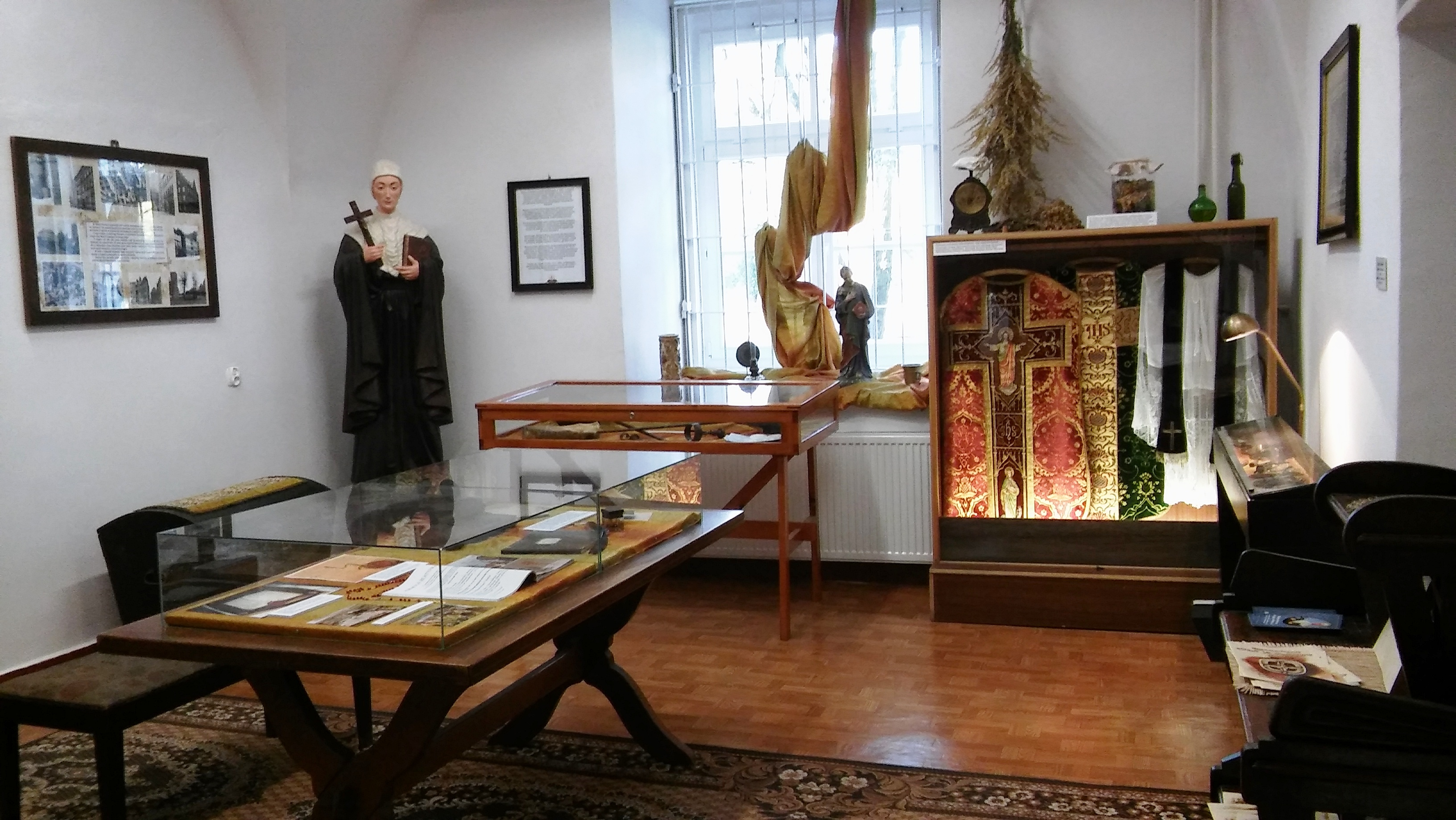 Muzeum Ziemi Braniewskiej Regina Protmann